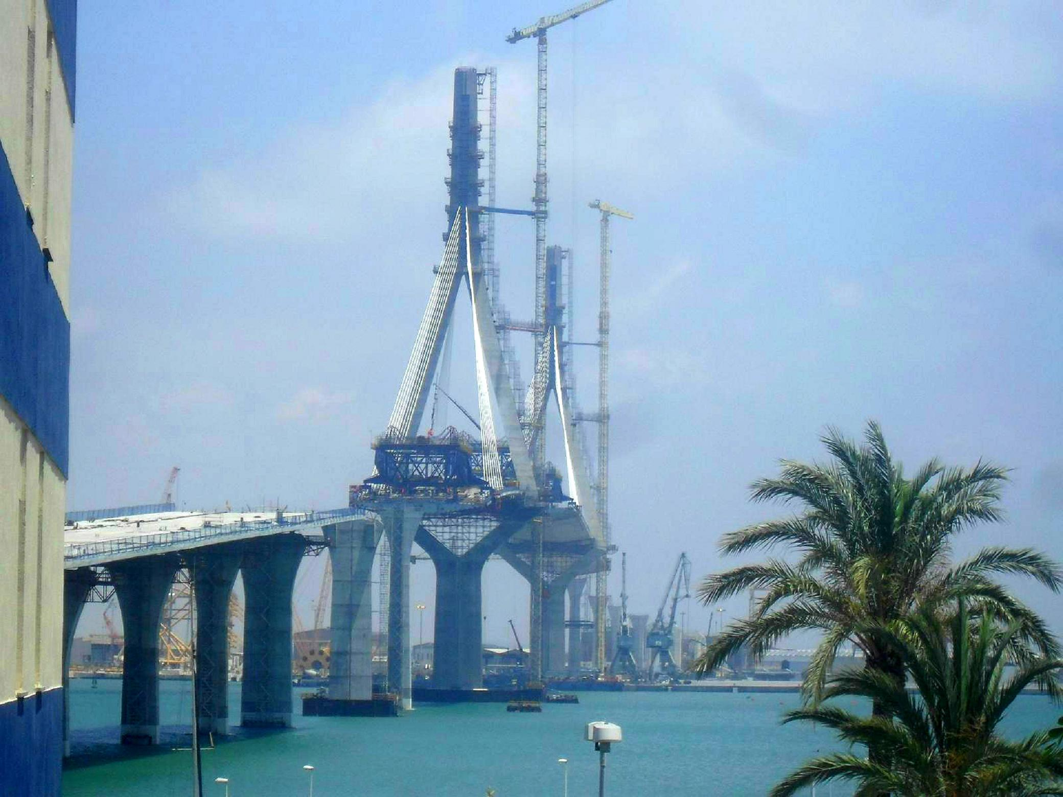 Construcción del Puente de la Constitución de 1812, Cádiz.